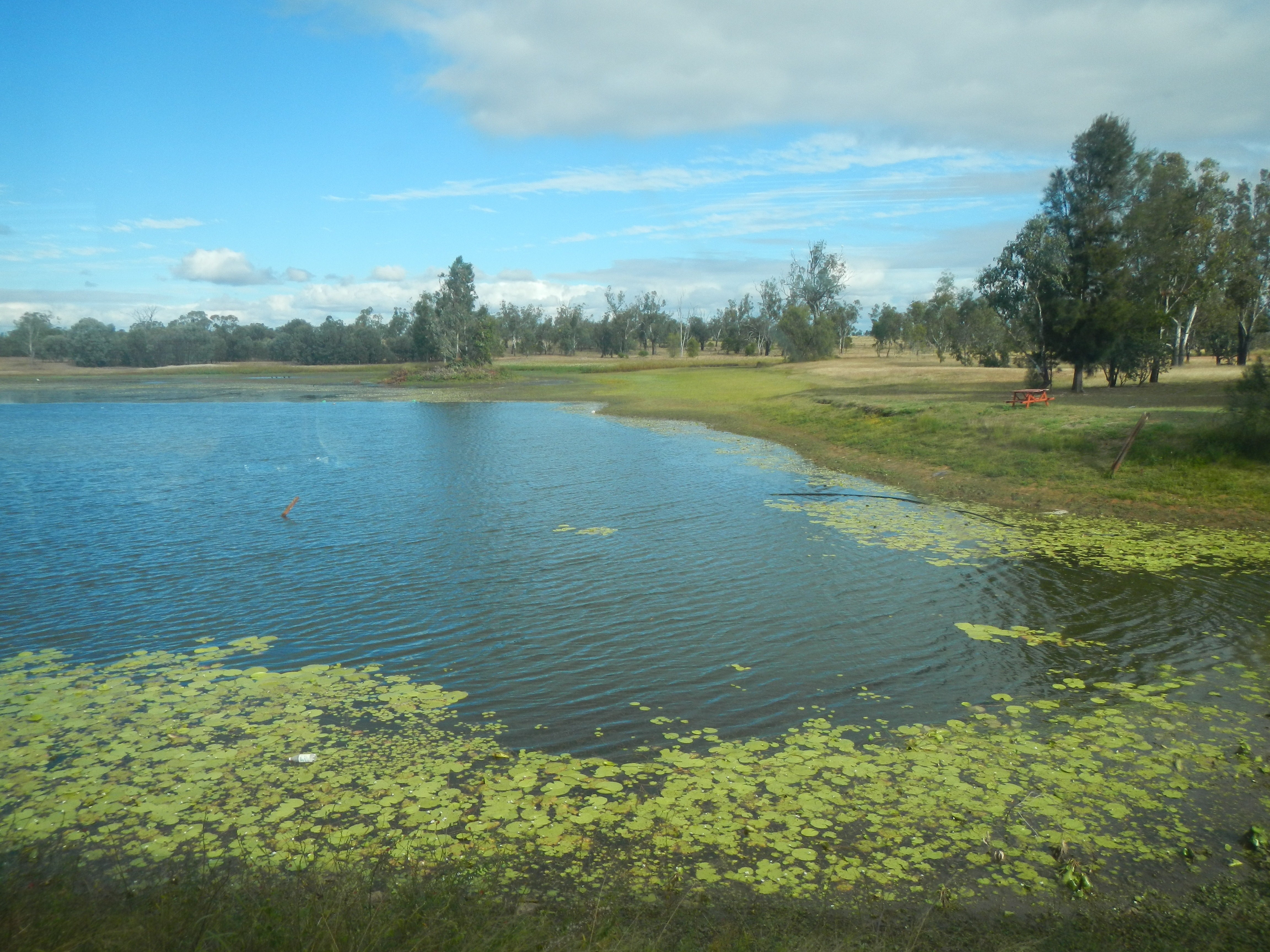 Anakie Billabong